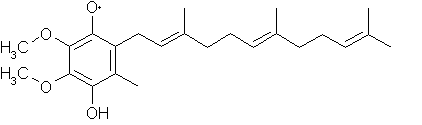 semiquinonic form of ubiquinone (coenzyme q)